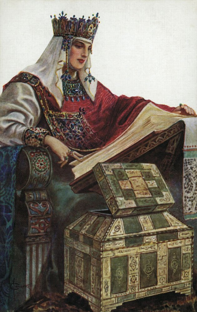 Апраксия Королевишна